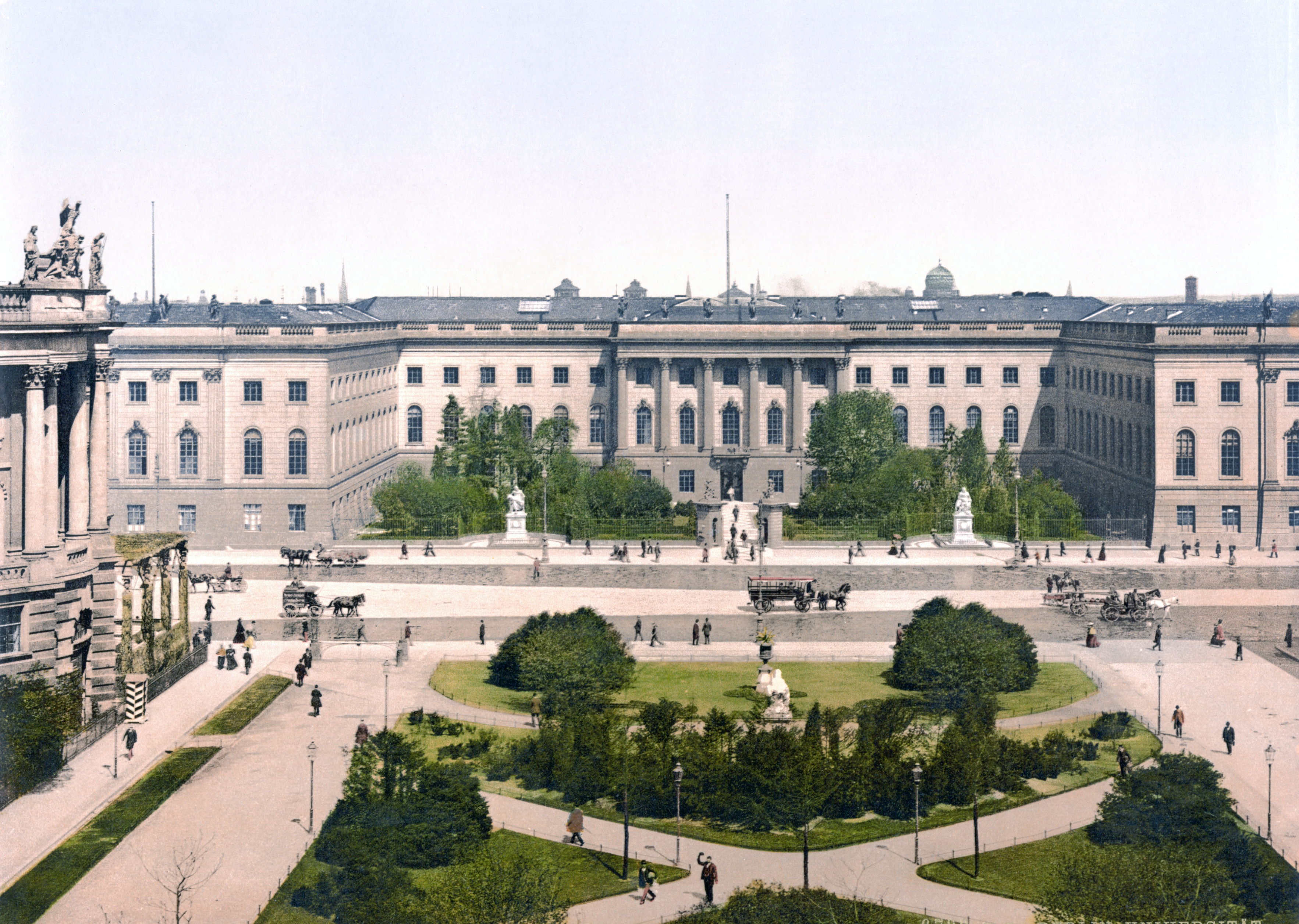 Berlin, Universität zwischen 1890 und 1900